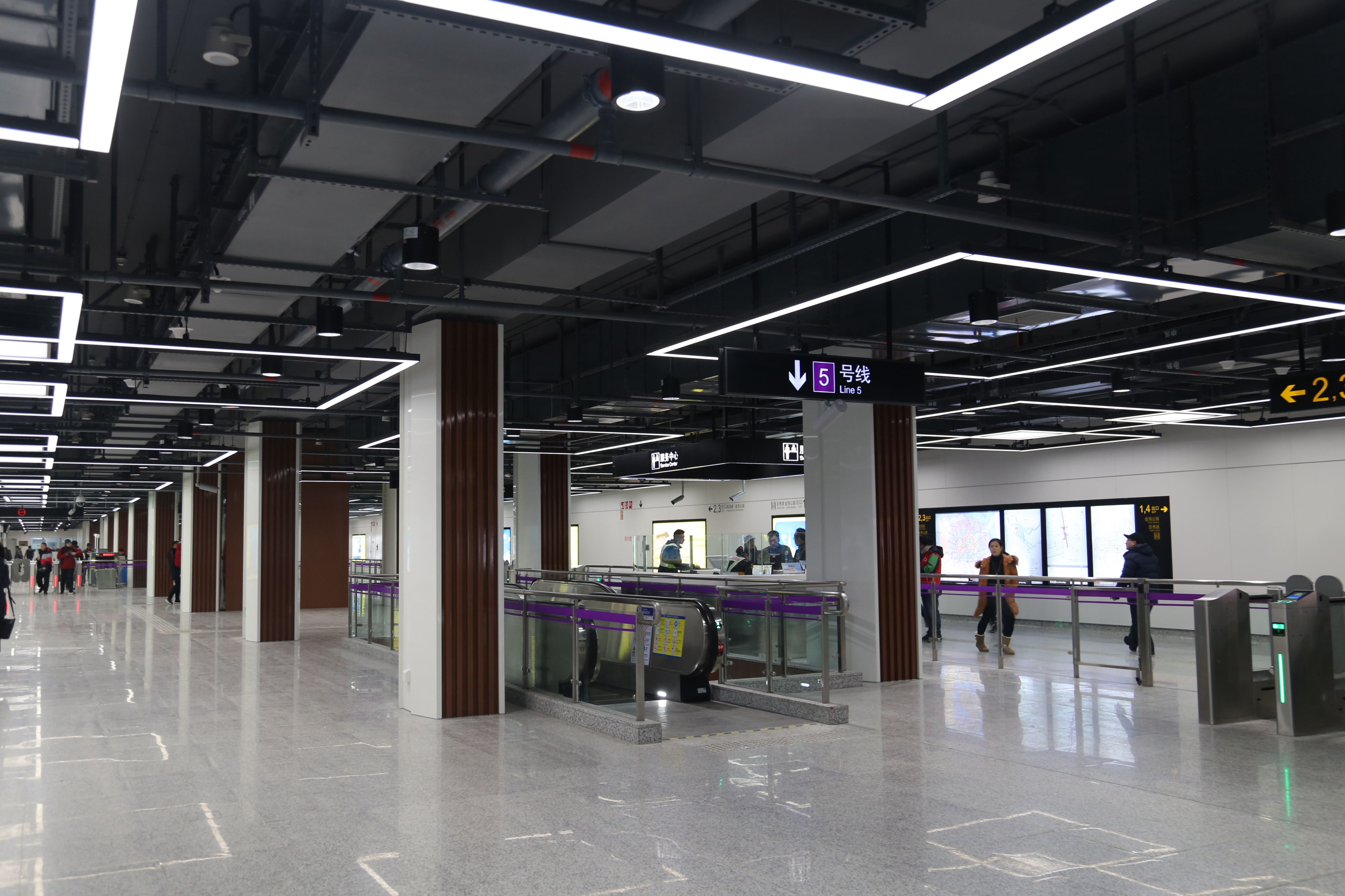 奉贤新城站站厅